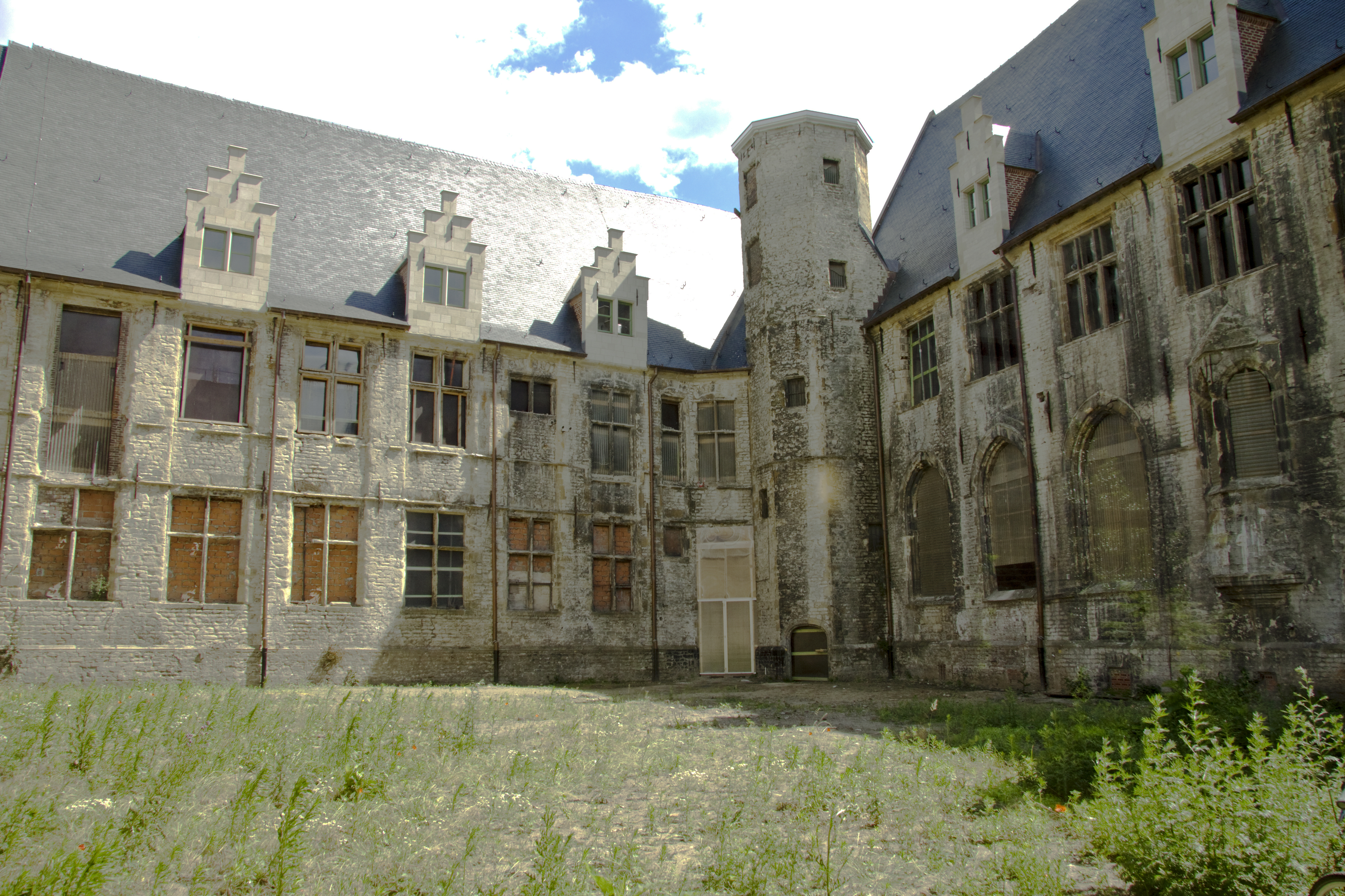 Caermersklooster